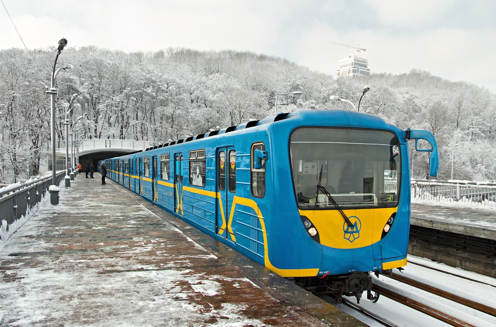 Электропоезд 81-540.2К-541.2К на станции Днепр Киевского метрополитена